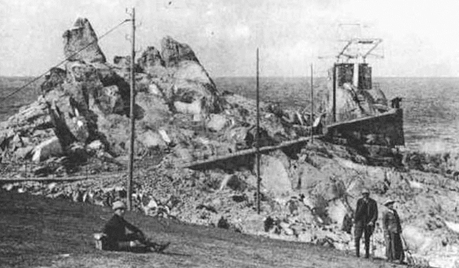 La cloche sous-marine d'Ouessant (photographie de Guillaume Lécuyer datant de 1912)